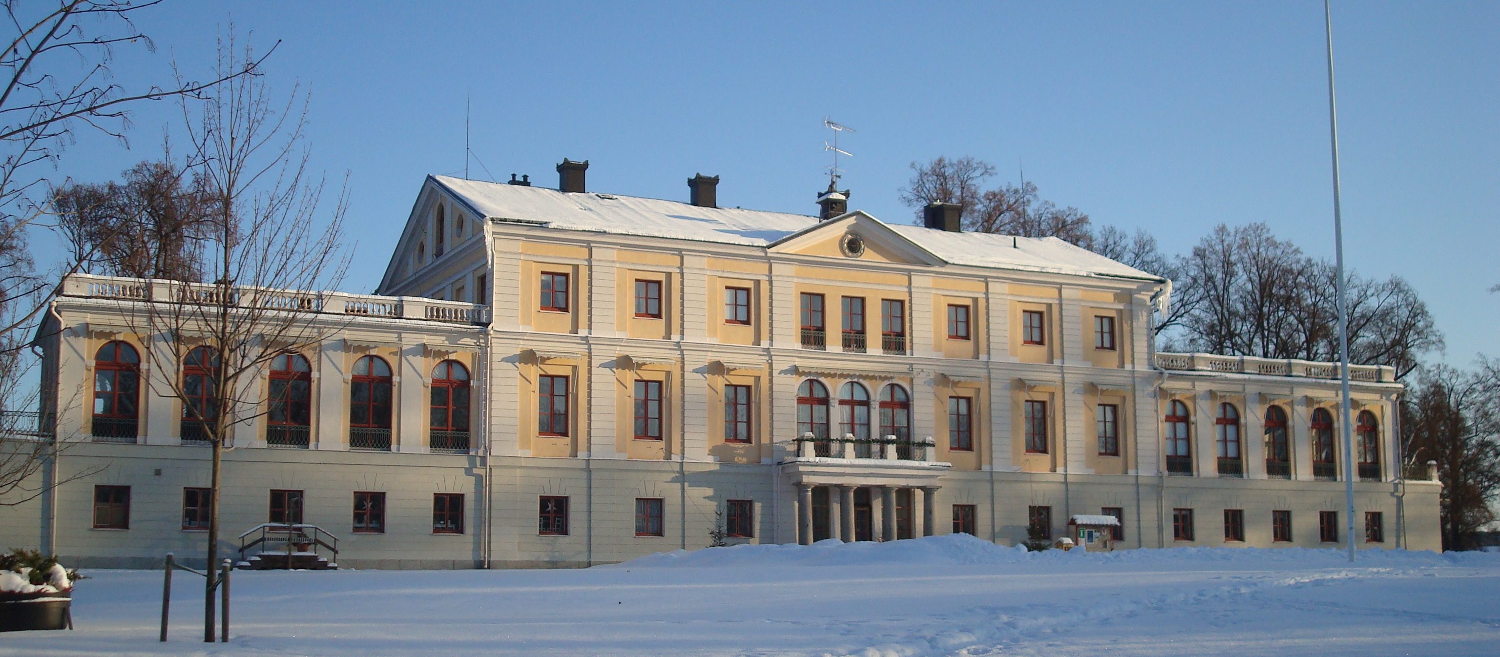 Säfstaholms slott, Vingåkers kommun, Södermanland, Sverige